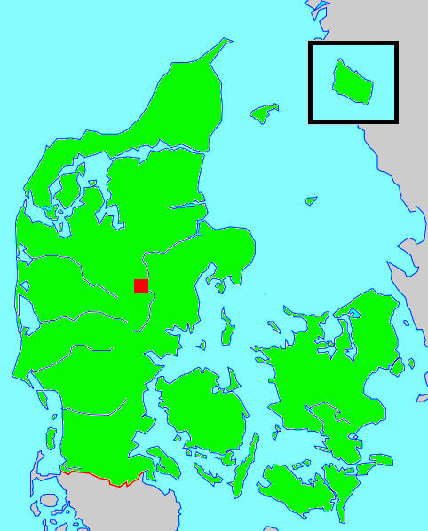 Kort sem sýnir staðsetningu Silkeborgar í Danmörku.